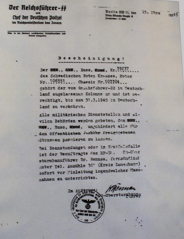 Bescheinigung von Himmler für die Weißen Busse aus Schweden